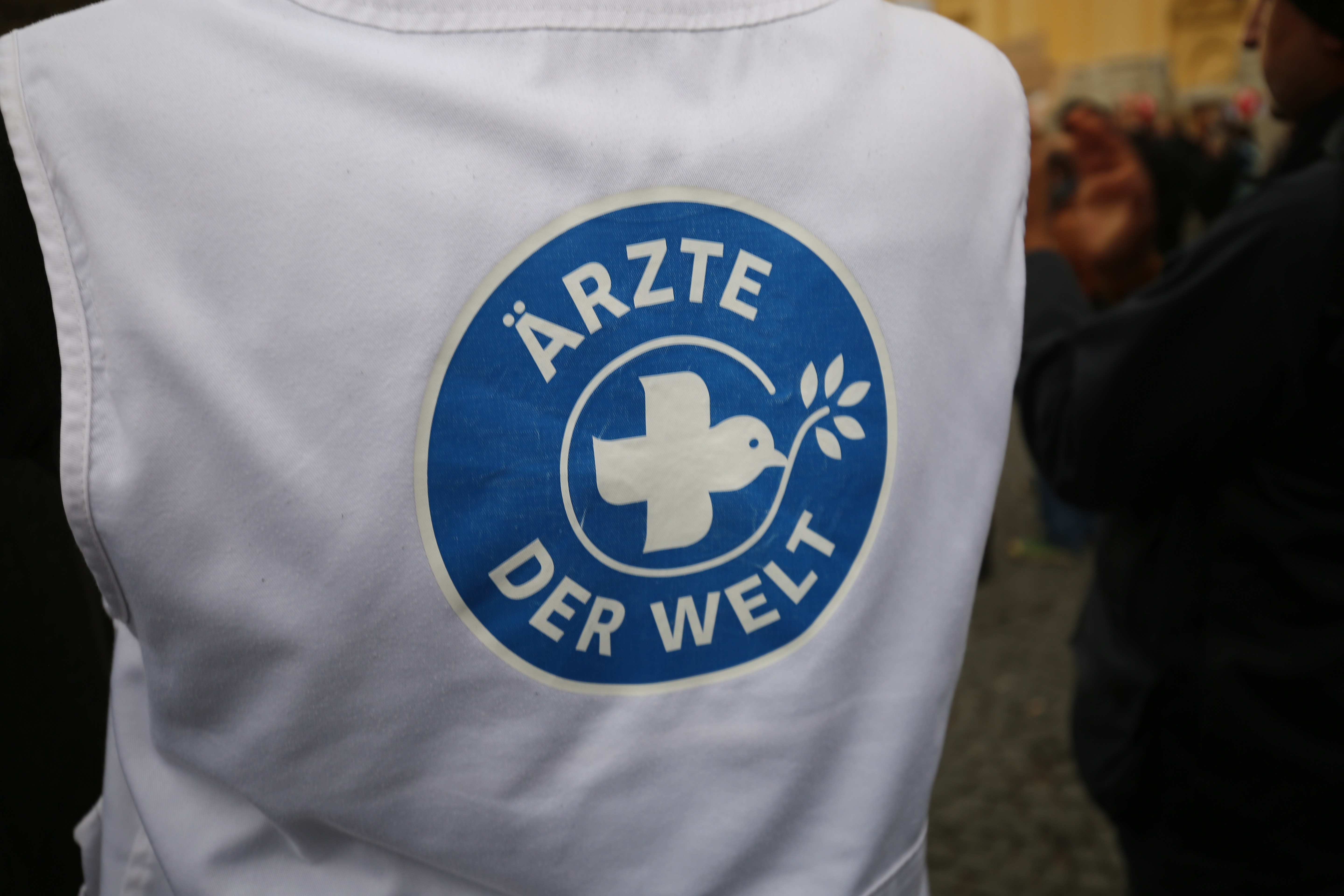 Ärzte der Welt, die deutsche Organisation von "Medicens du monde"